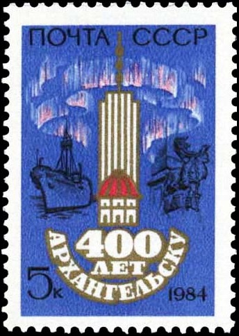 Почтовая марка СССР №5515. 400-летие Архангельска. Тираж 5500